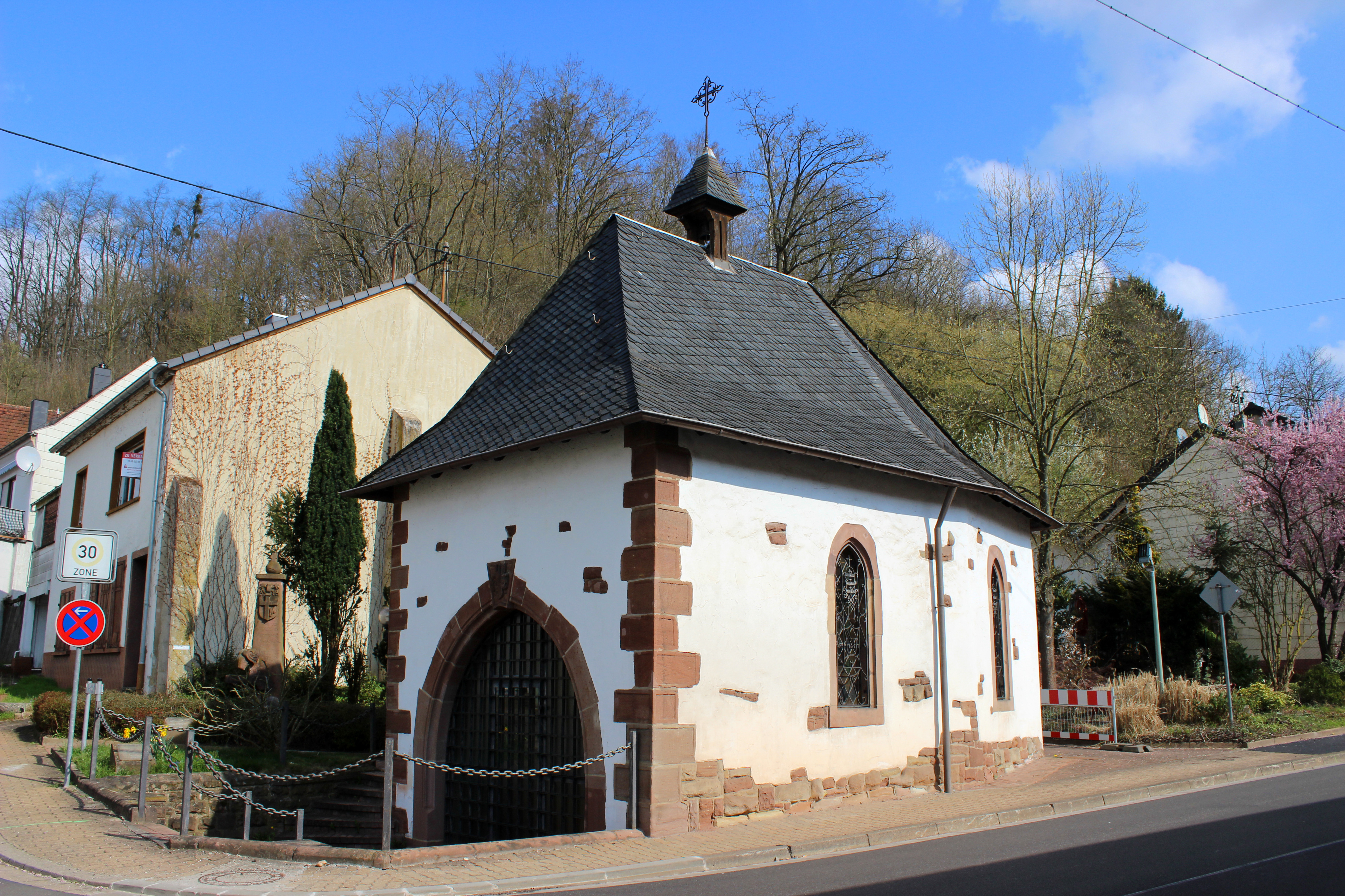 Marzelluskapelle, Beckingen, Landkreis Merzig-Wadern, Saarland